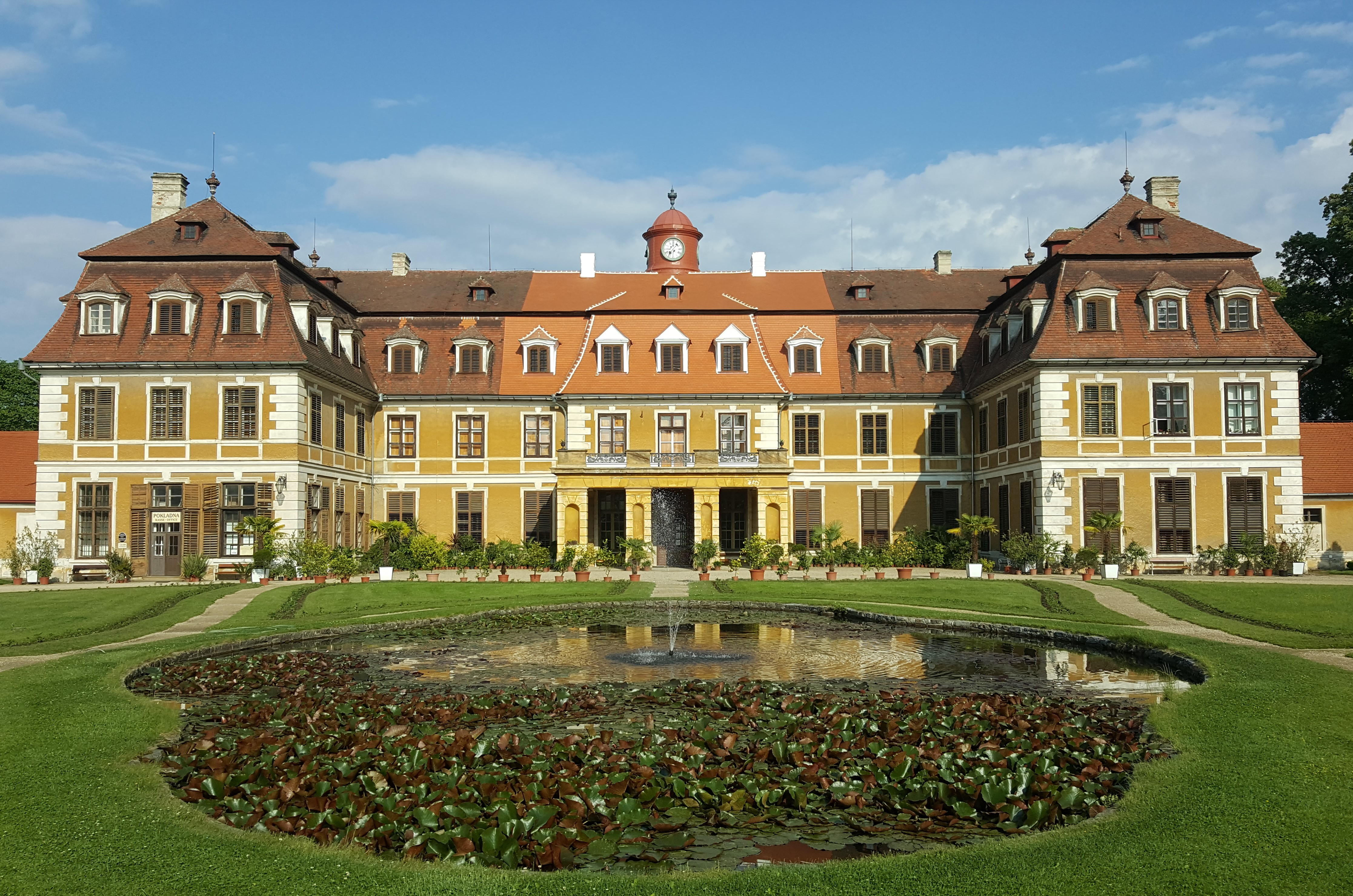 Zámek Rájec nad Svitavou